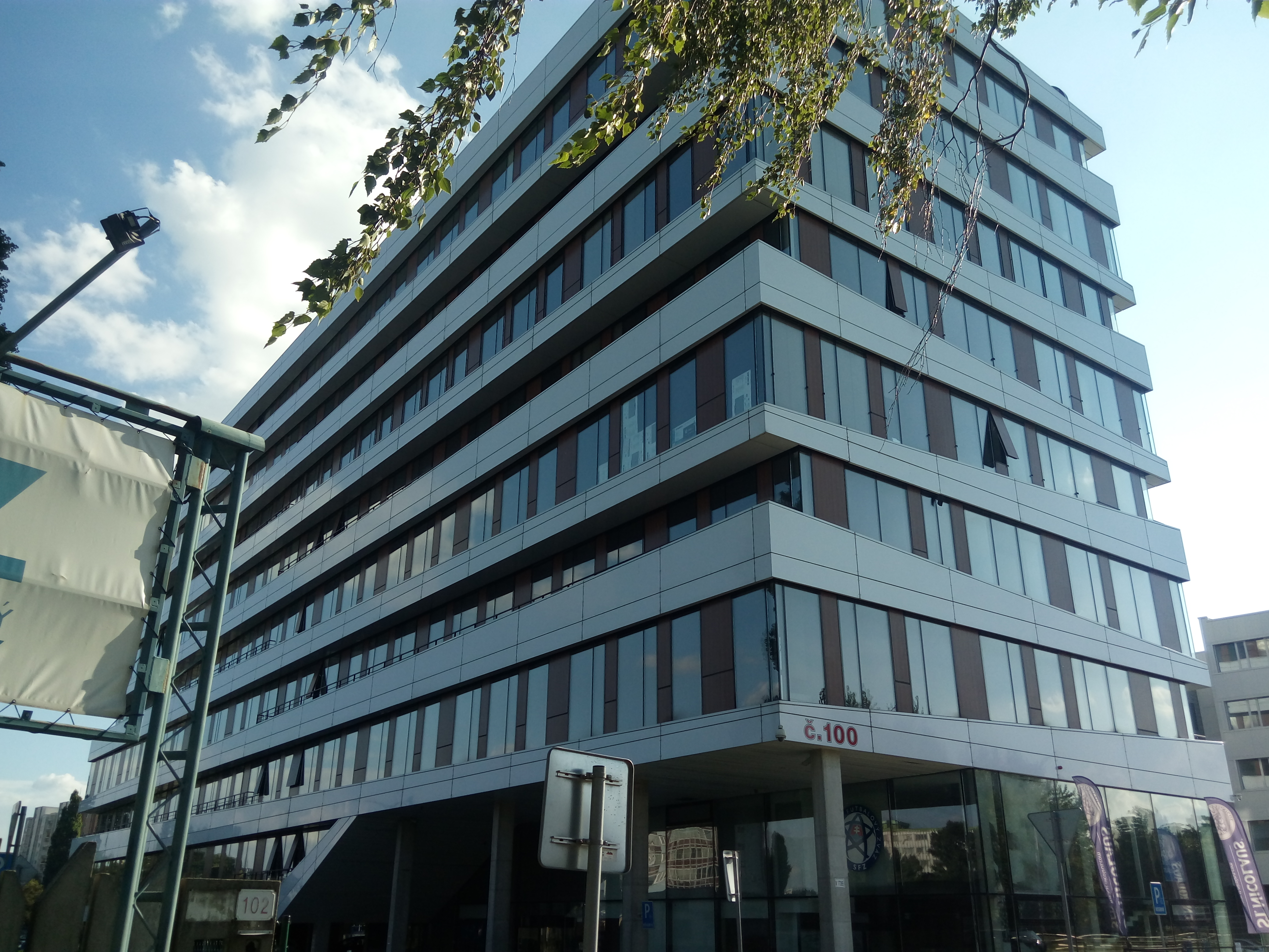 Trnavská cesta 100, Ružinov, Bratislava